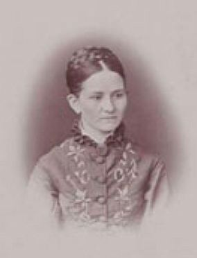 Юлия Ивановна Базанова (урождённая Лявдонская) (1852–1924) — купчиха 1-й гильдии, благотворительница, почётный гражданин Иркутска и Москвы.